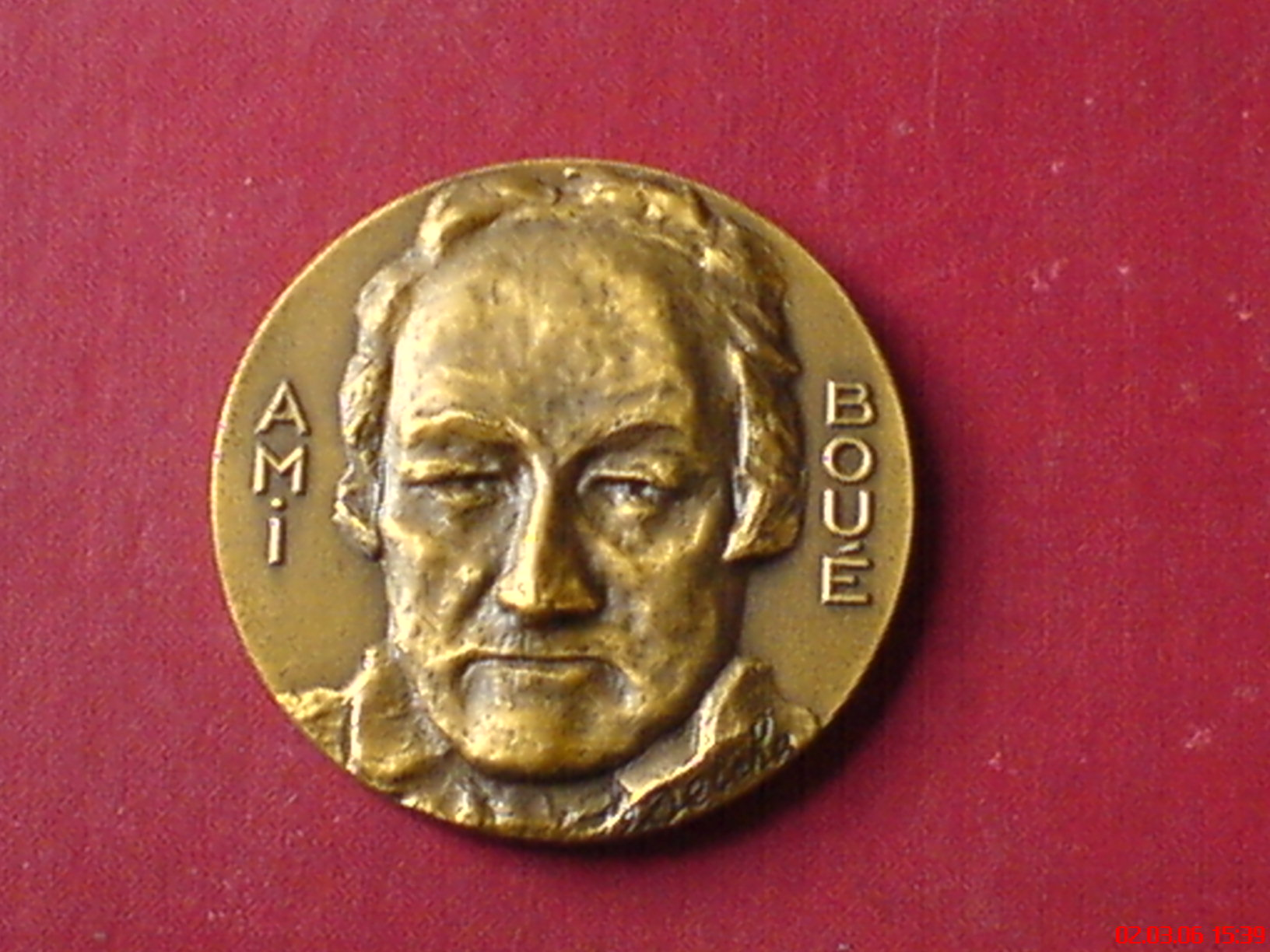 Ami Boué , Médaille de la SGF, Auteur Georges Deicha